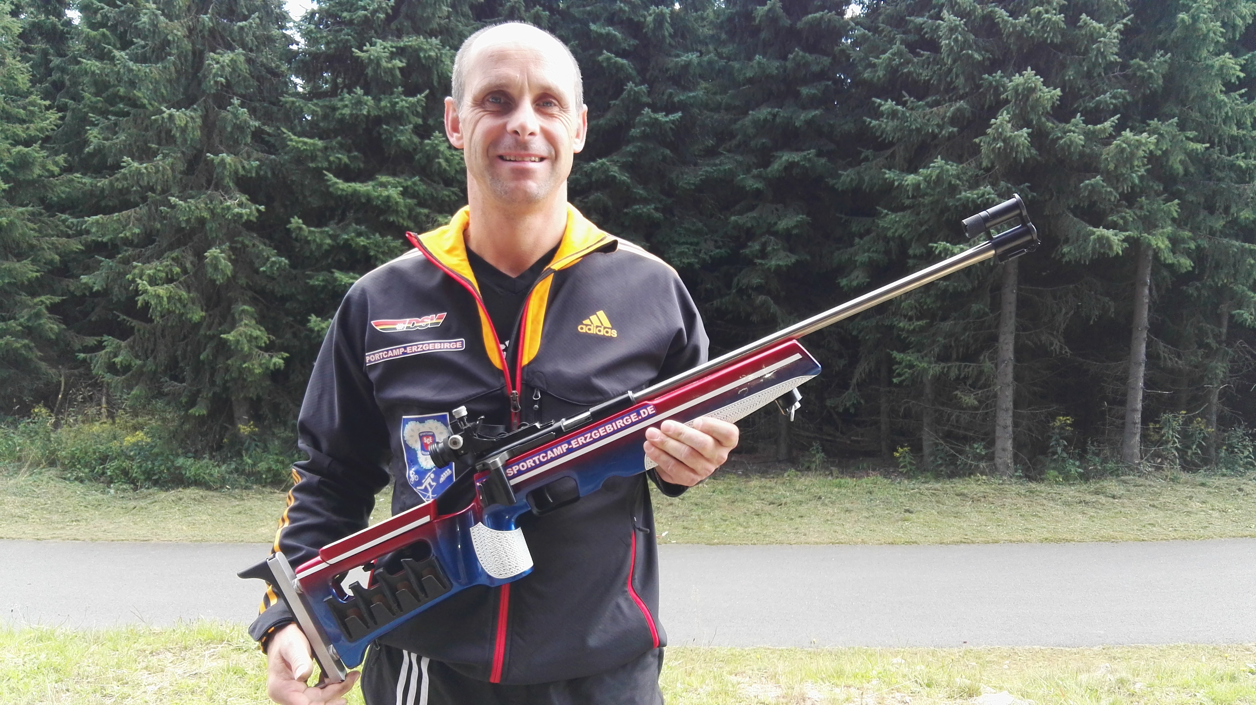 Biathlet Carsten Heymann, 2016